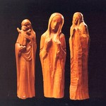 Peter Horn Werner, nació en Munich, Alemania, el 8 de abril de 1908 y falleció en Santiago de Chile, el 11 de abril de 1969. Fue un connotado escultor religioso alemán - chileno